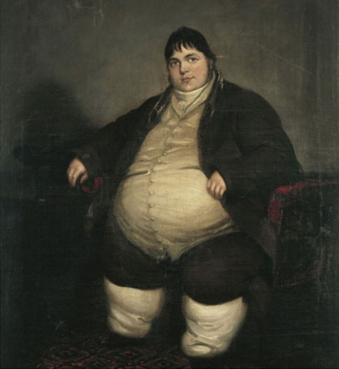 Portrait of Daniel Lambert (1770-1809)